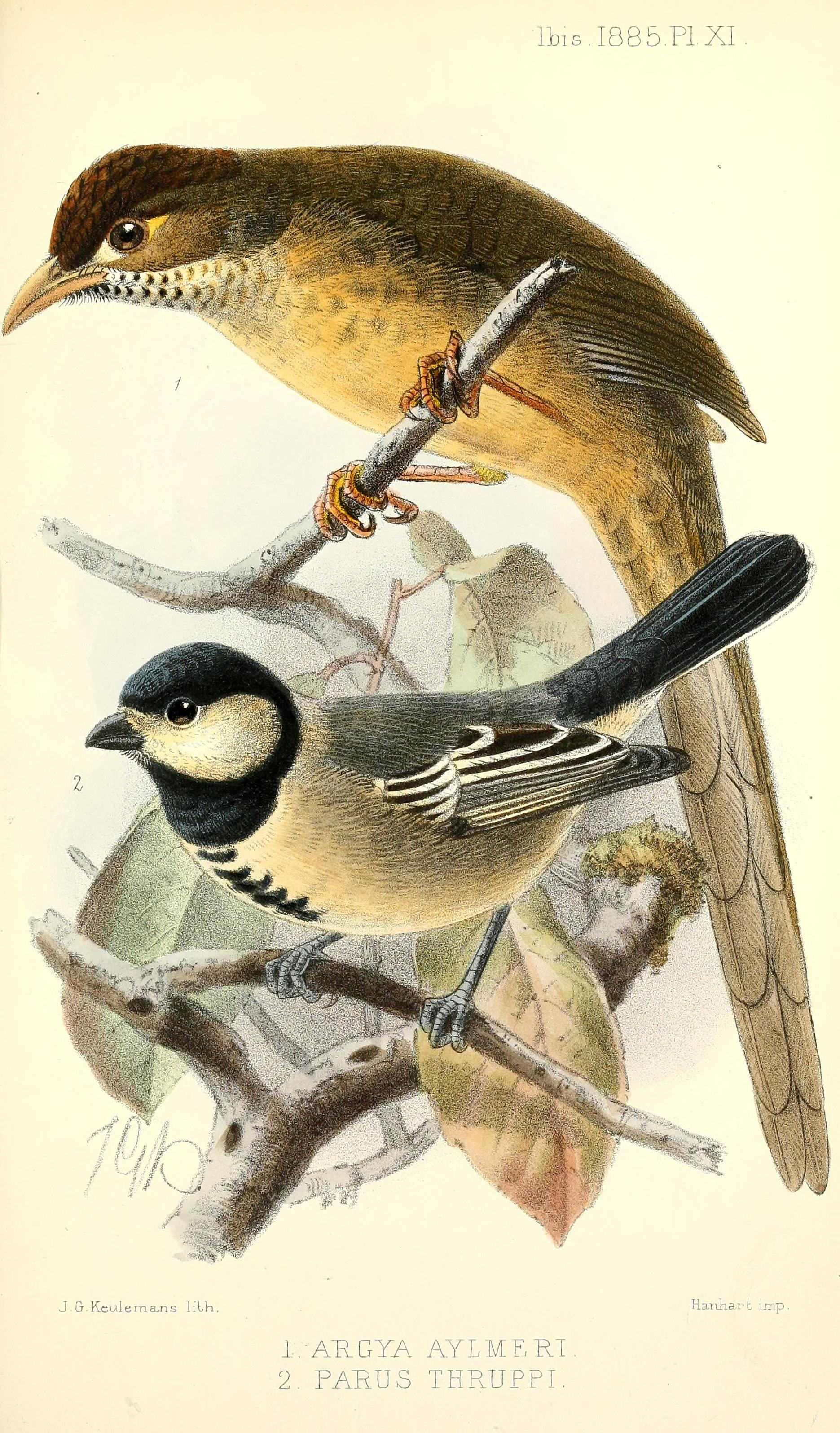 Argya aylmeri (= Turdoides aylmeri) and Parus thruppi (= Melaniparus thruppi)